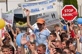 Marsz dla Życia i Rodziny, Warszawa